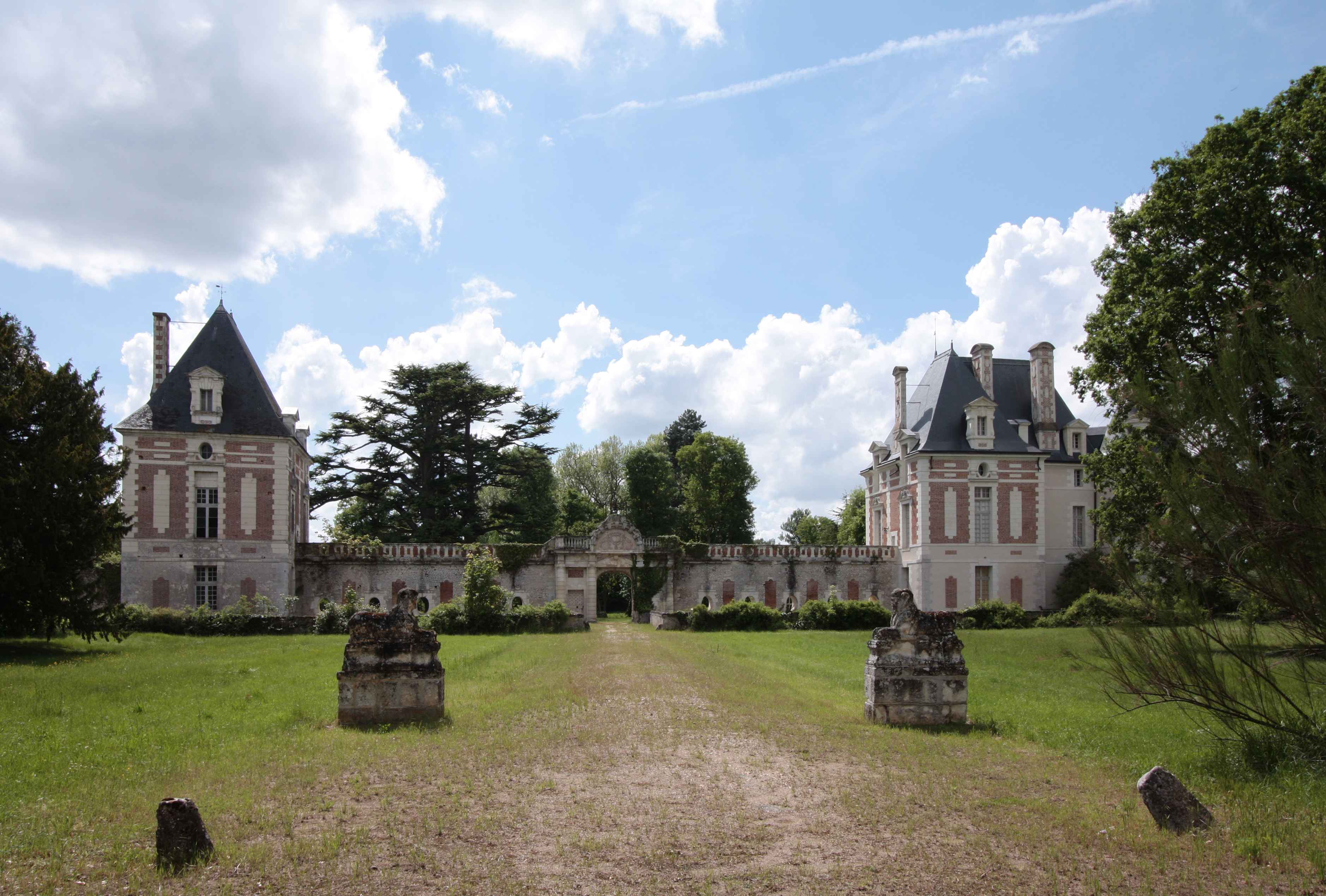 Schloss Selles im Département Loir-et-Cher/Frankreich - Erhaltene Teile der Schlossanlage: zwei RenaissancePavillons, verbunden durch eine Arkadenmauer.